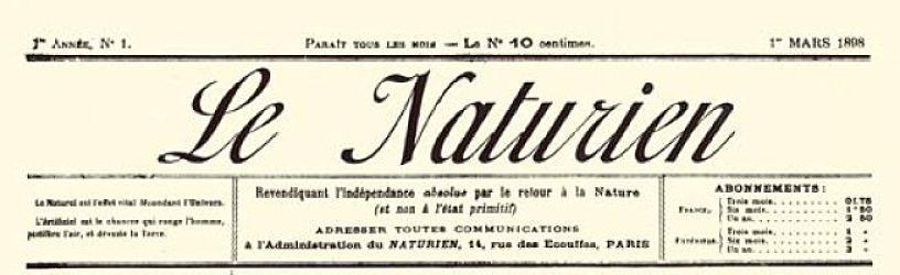 Le Naturien est un périodique mensuel libertaire publié en 1898 et « revendiquant l'indépendance absolue par le retour à la Nature (et non à l'état primitif) » En-tête du premier numéro du 1er mars 1898